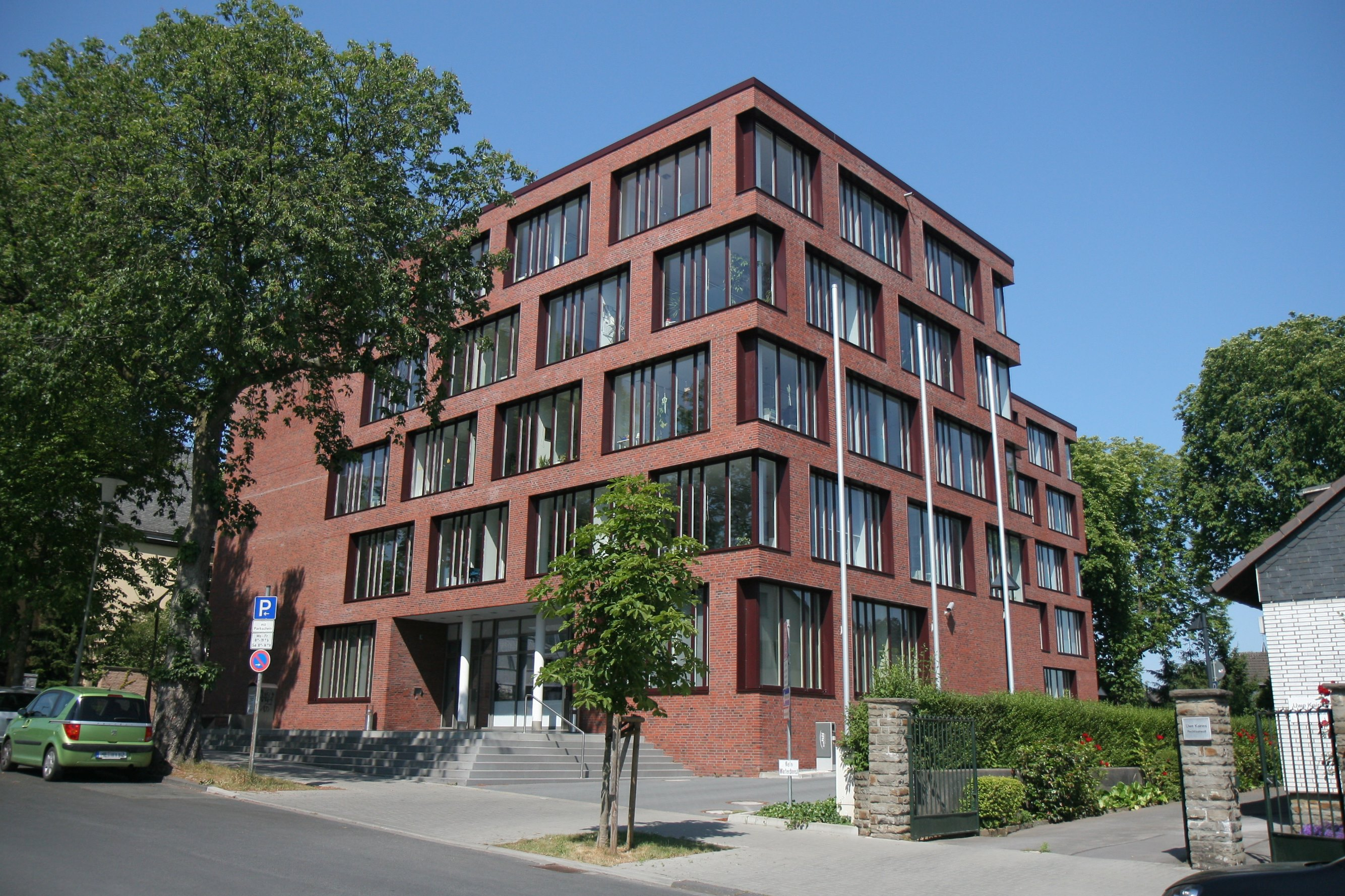 Amtsgericht Mettmann in Mettmann; Neubau Gartenstraße 7.